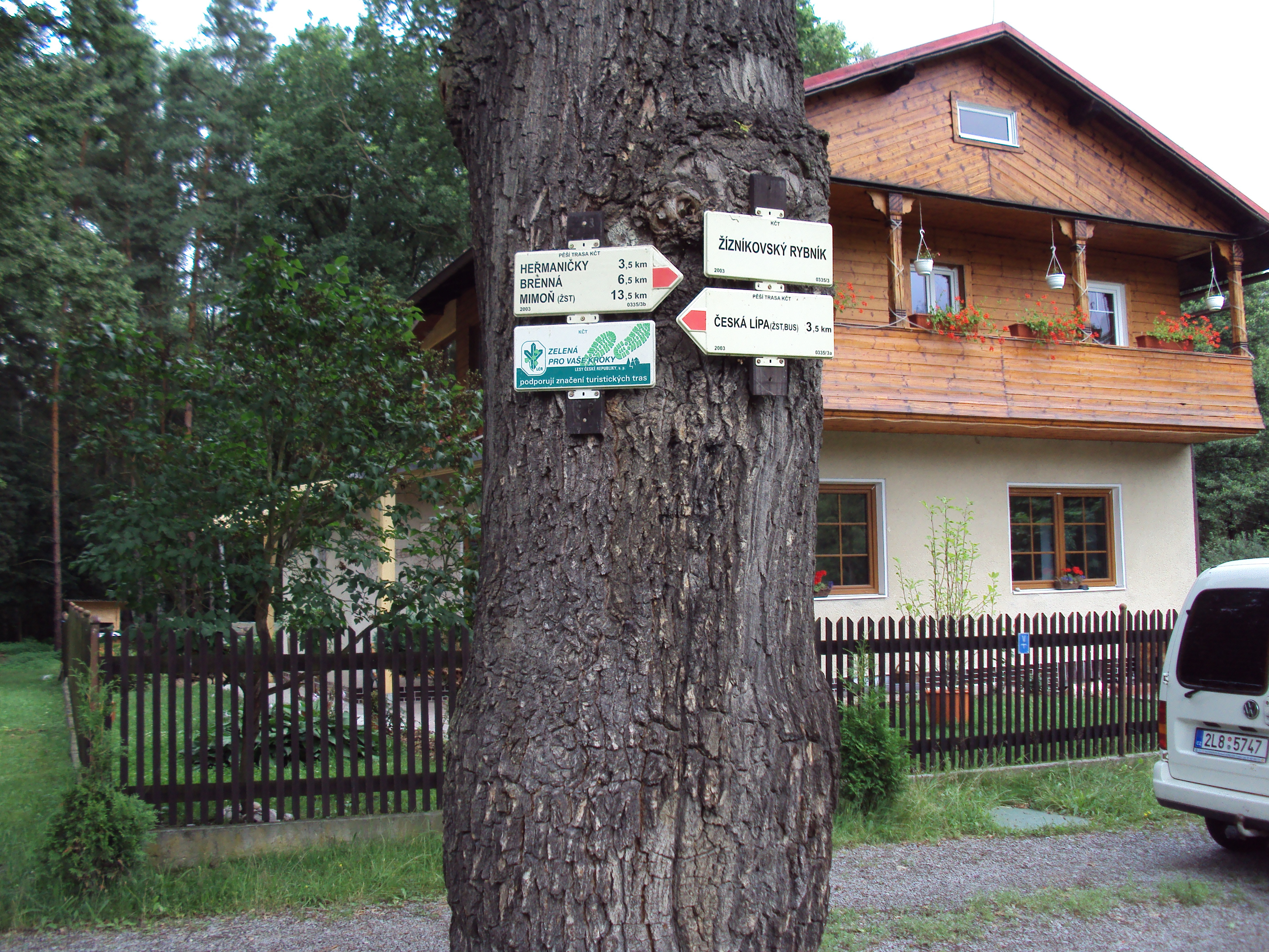 Rozcestník na hrázi rybníka v Žízníkově